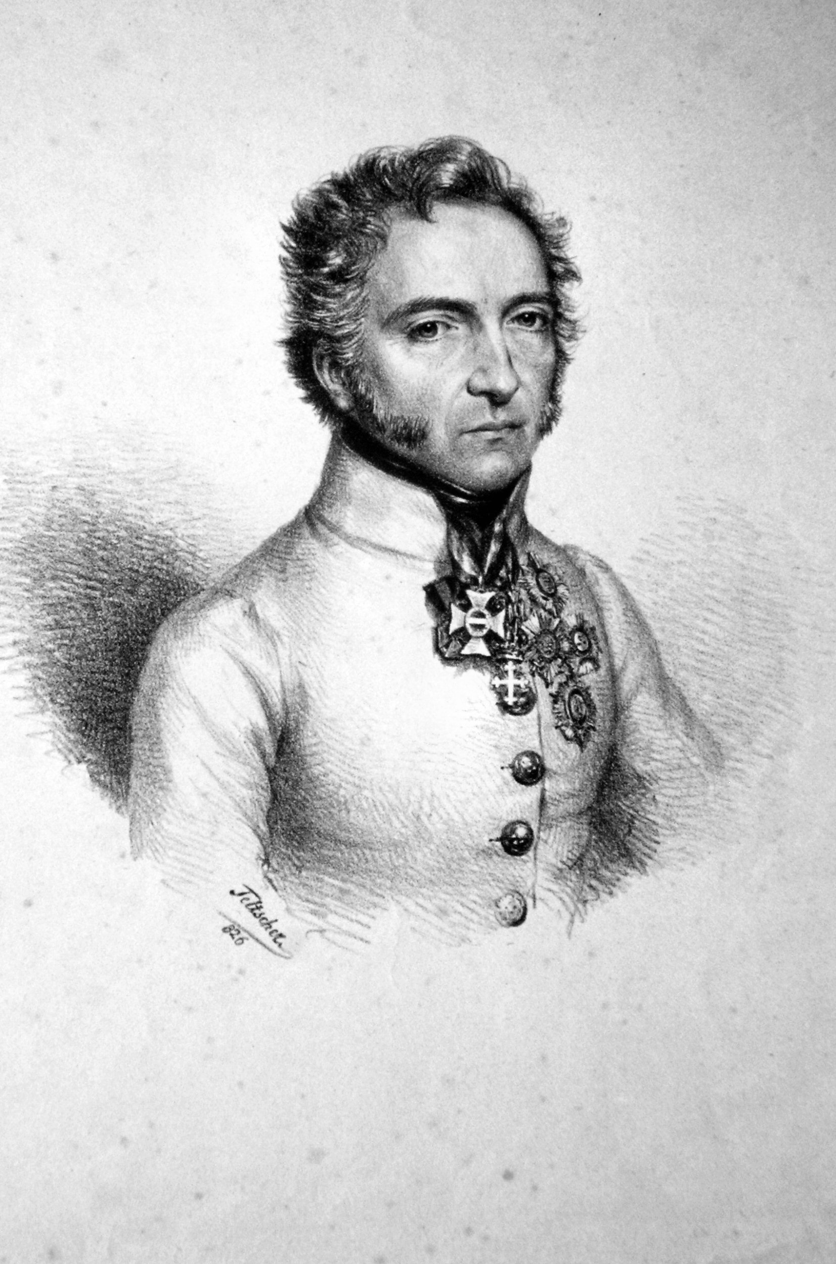 Laval Nugent, Graf von Westmeath (1777-1862) k. k. Feldmarschall, Kommandeur des Maria-Theresien-Ordens. Lithographie von Josef Eduard Teltscher, 1826